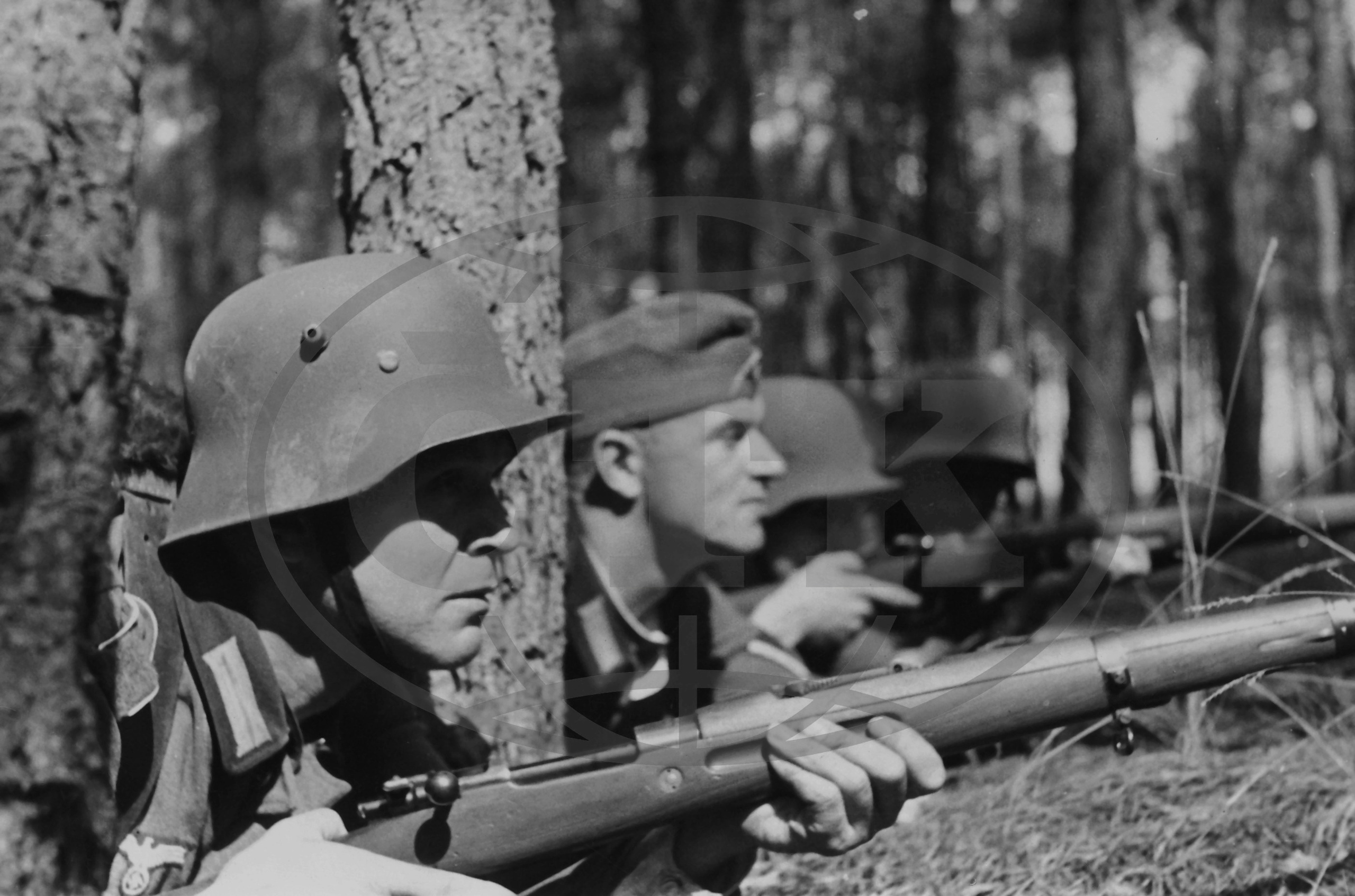 Трофейная vz 24 в вермахте